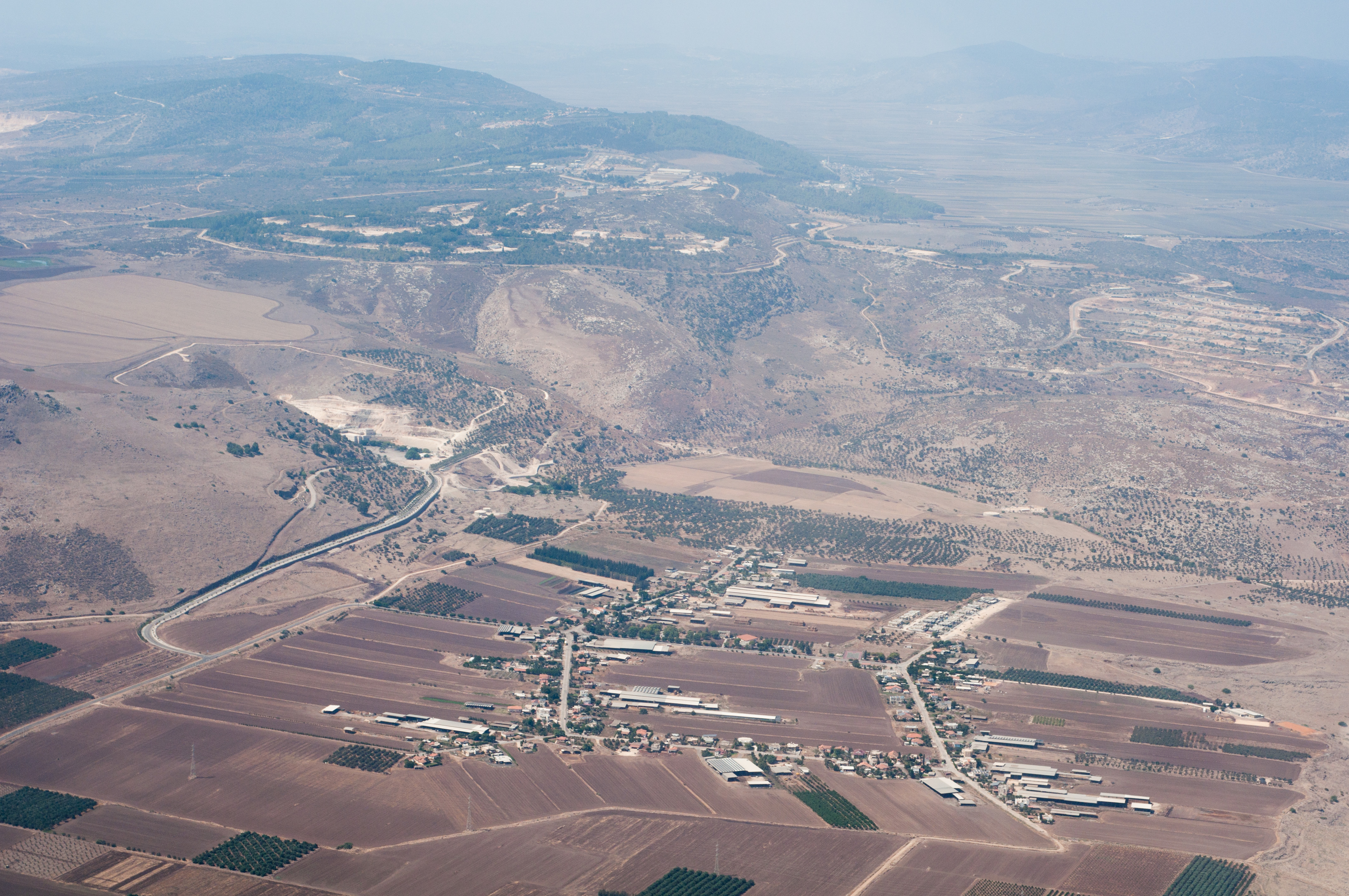 כפר זיתים